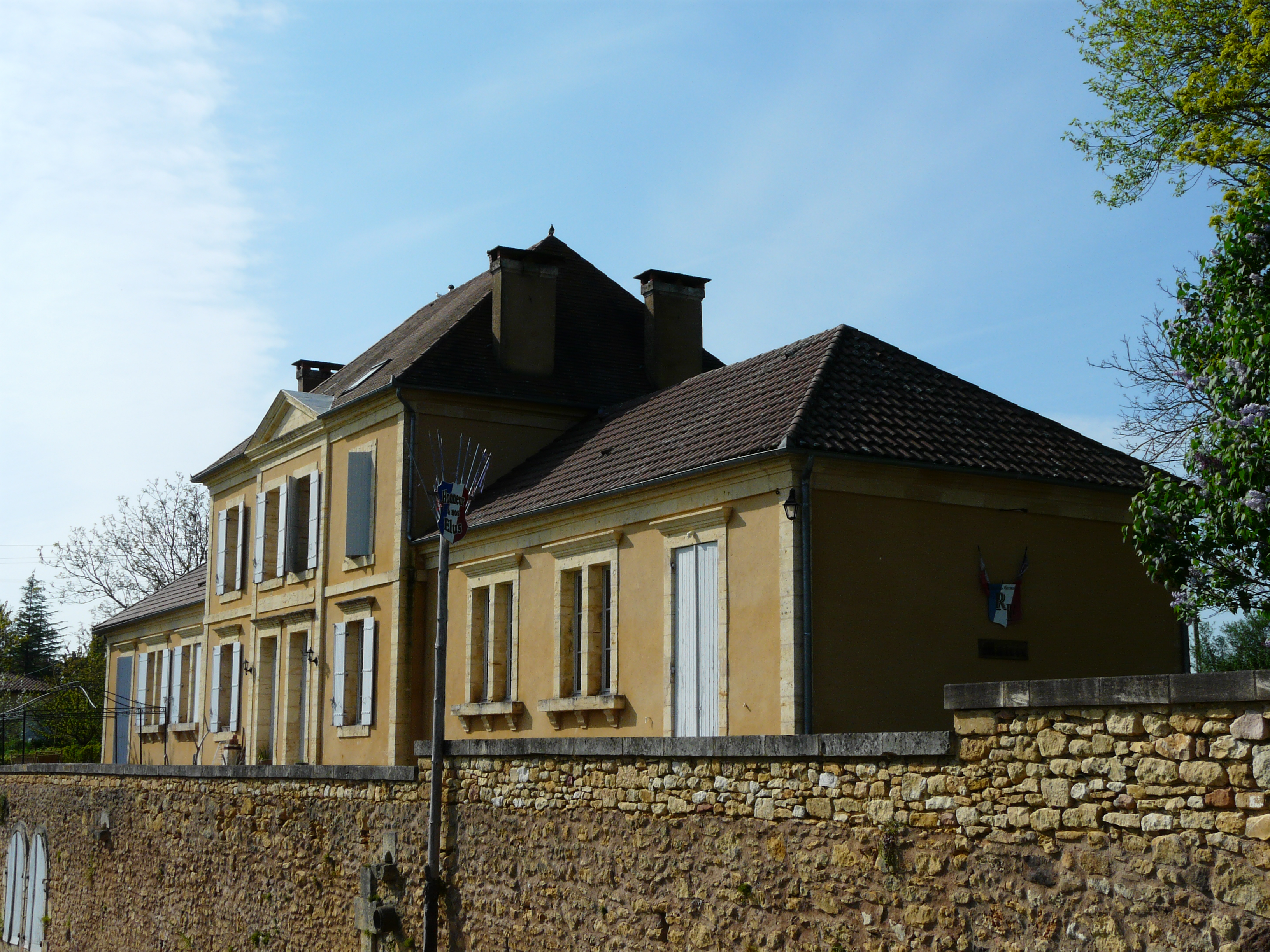 La mairie de Saint-Germain-de-Belvès, Dordogne, France.